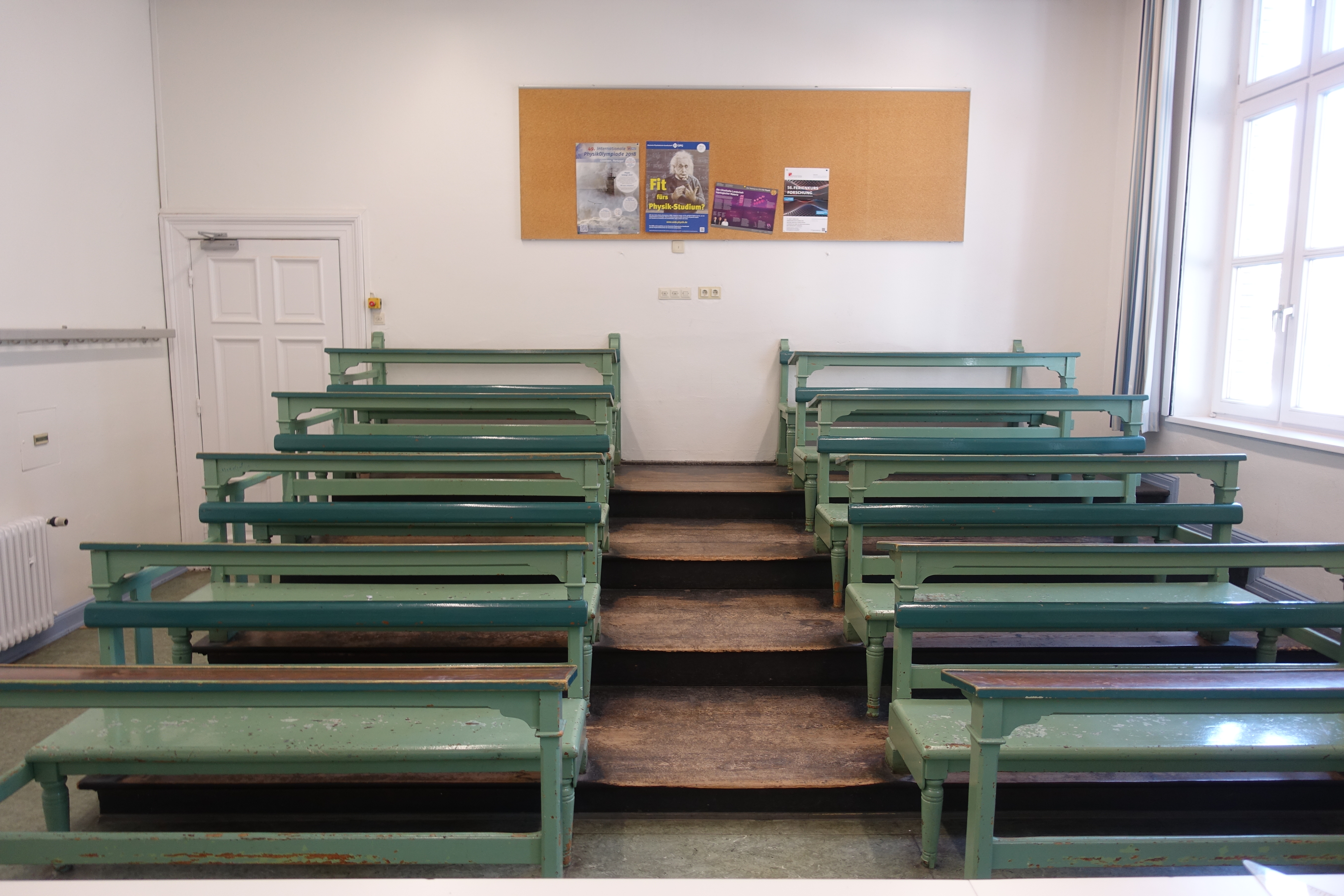 Abendschule vor dem Holstentor Hamburg hat noch Schulbänke aus der Gründerzeit